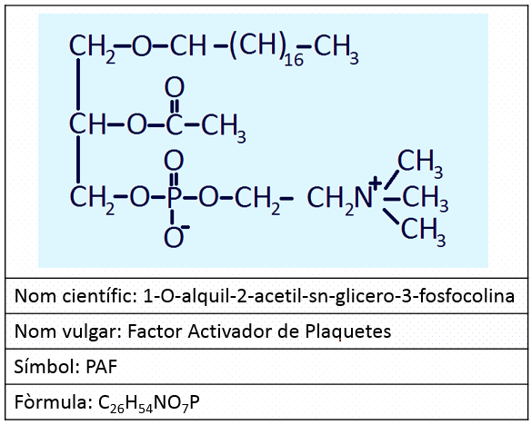 Fòrmula PAF